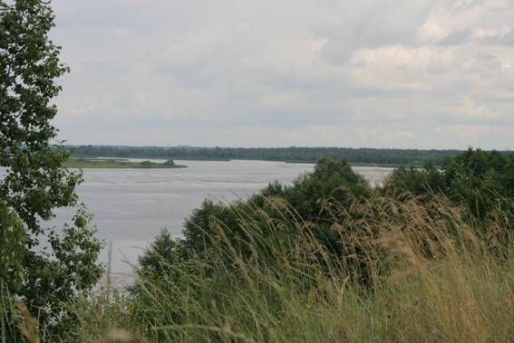 Липецкая область, река Матыра